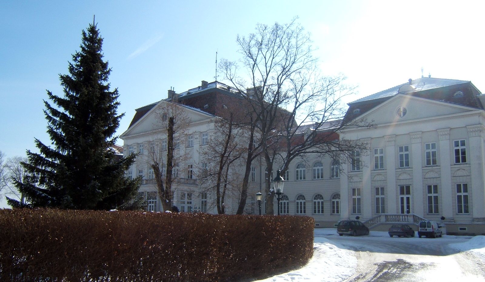 Schloss Wilhelminenberg in Wien (16. Bezirk)